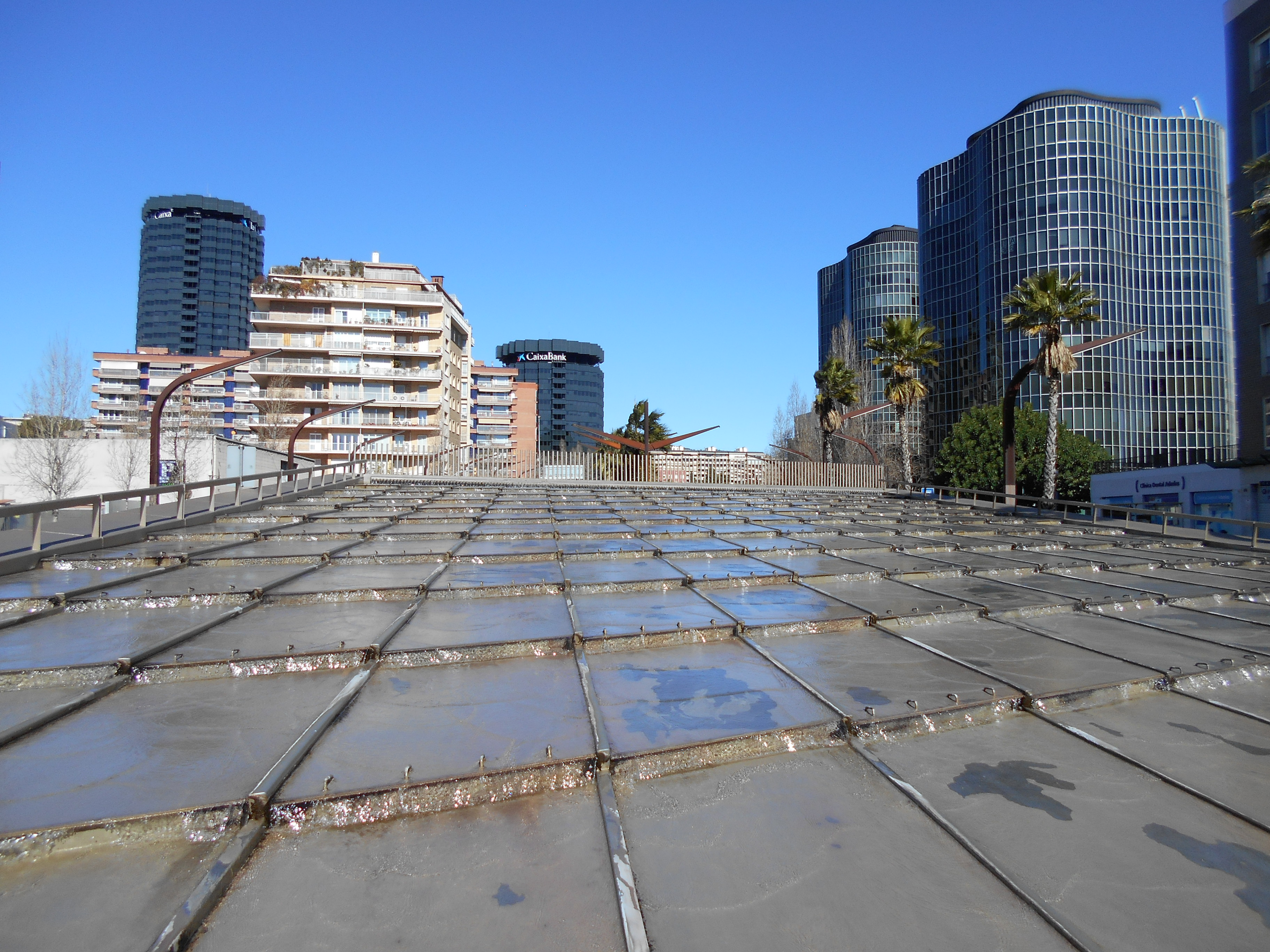 Fuente de Carlos III (Barcelona).